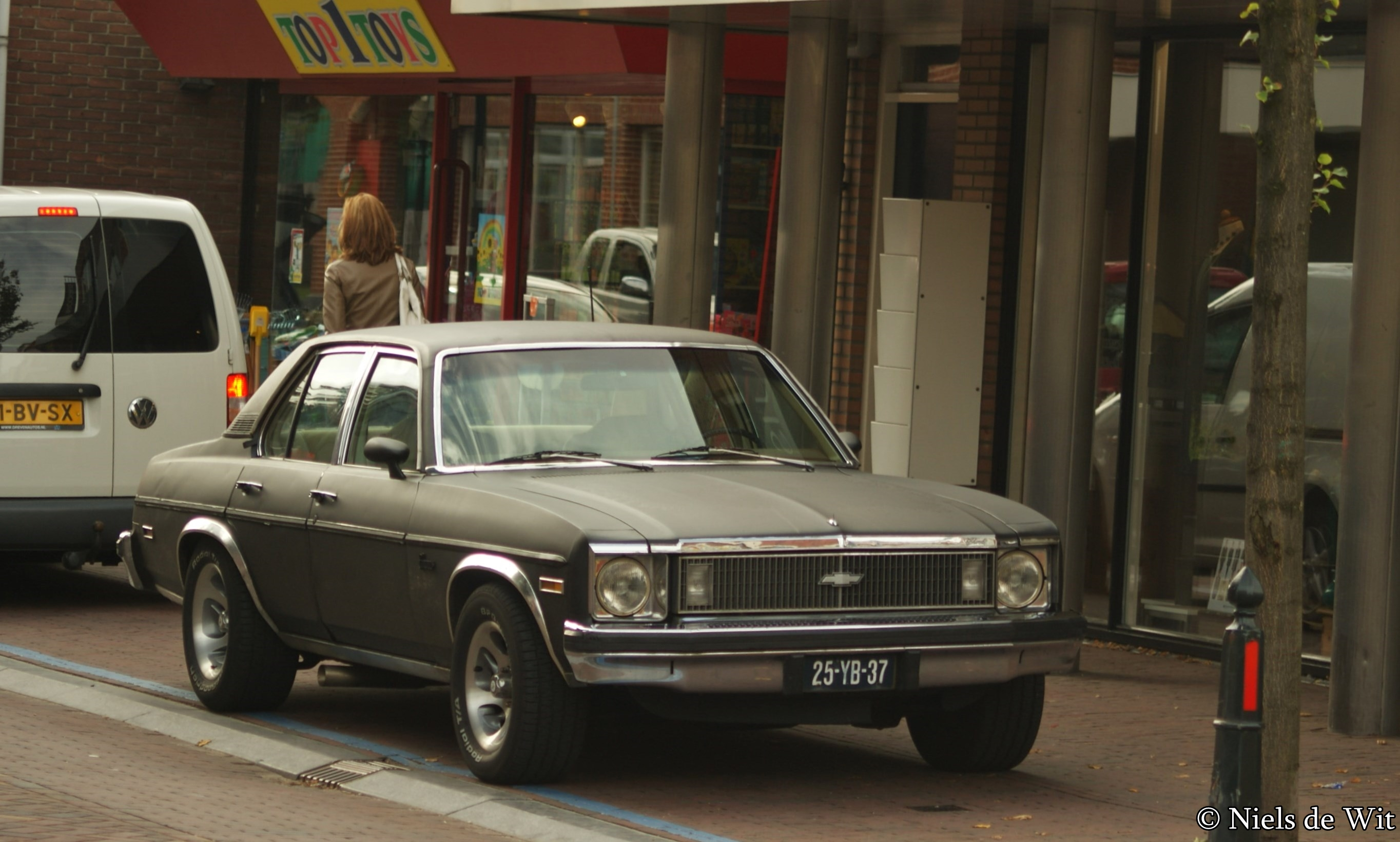 25-YB-37